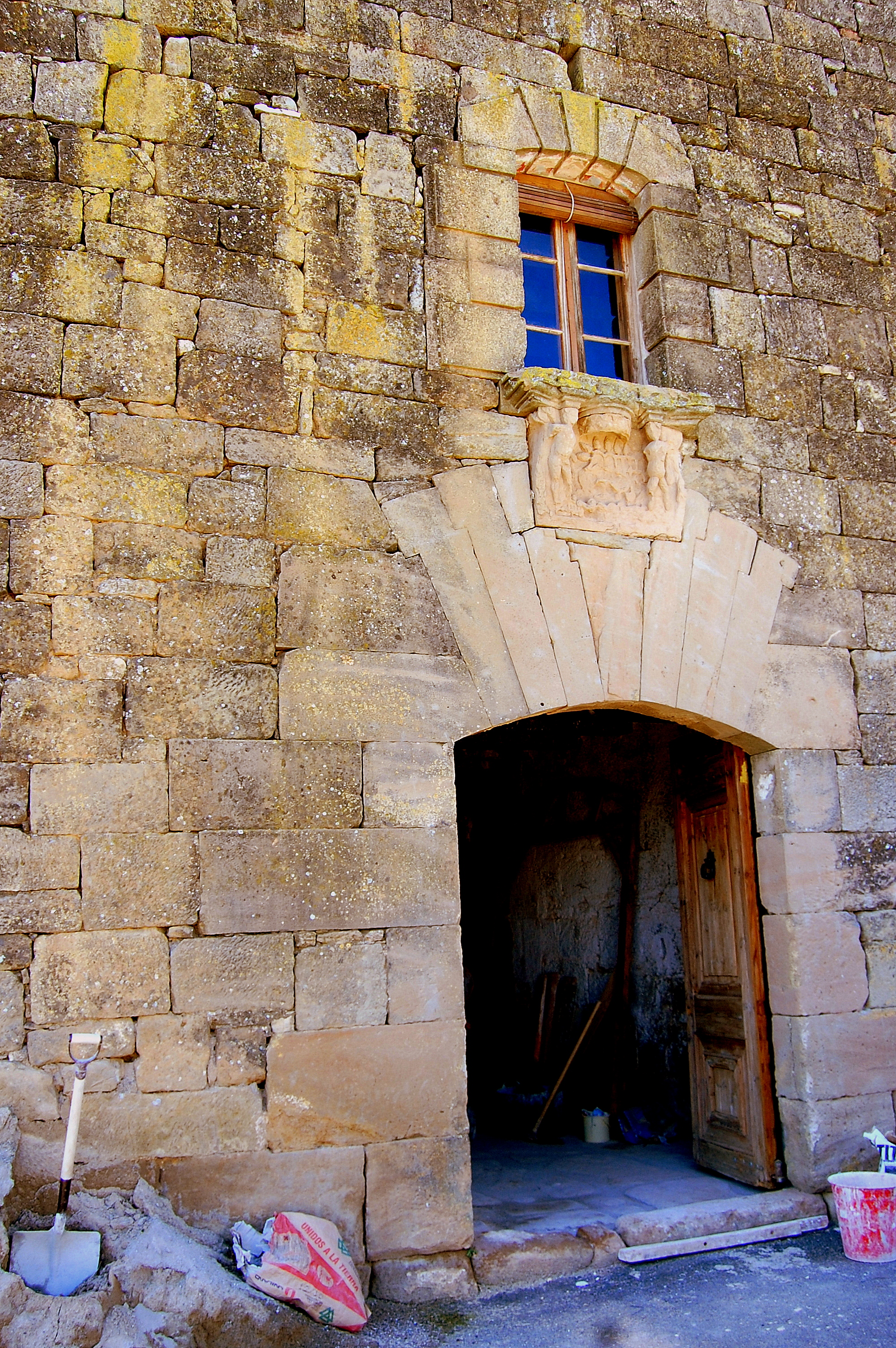 Castell de Seró (Artesa de Segre)